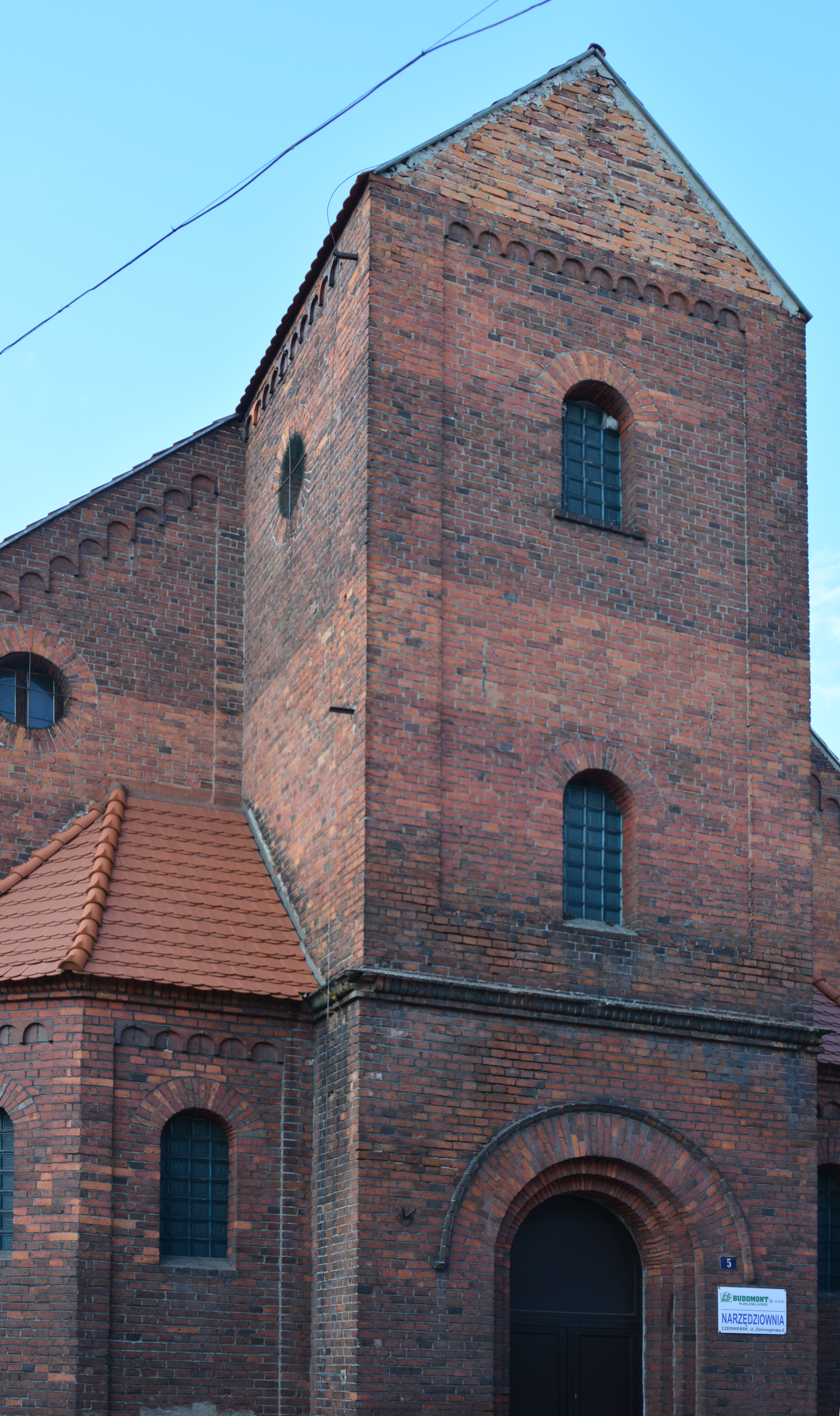 Czerwieńsk, ul. Zielonogórska 5 - dawny kościół luterański, obecnie magazyn, poł. XIX, 1976